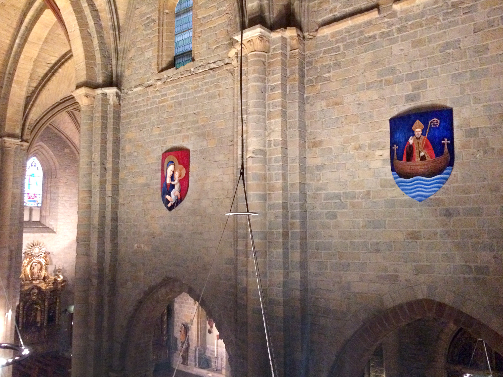 Escudos de los tres antiguos burgos y poblaciones de la ciudad de Pamplona (Navarra), que corresponden por orden, al burgo de San Cernin, la Navarrería, el actual escudo de la ciudad de Pamplona tras la unificación de los burgos, y por último, el de la población de San Nicolás